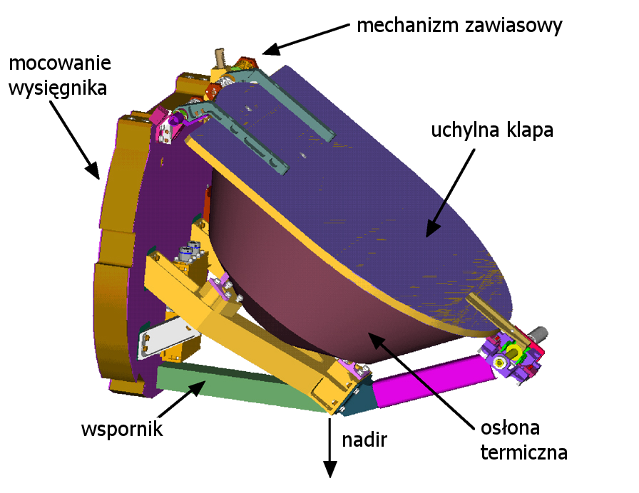 Schematyczny rysunek spektrometru GRE sondy 2001 Mars Odyssey.